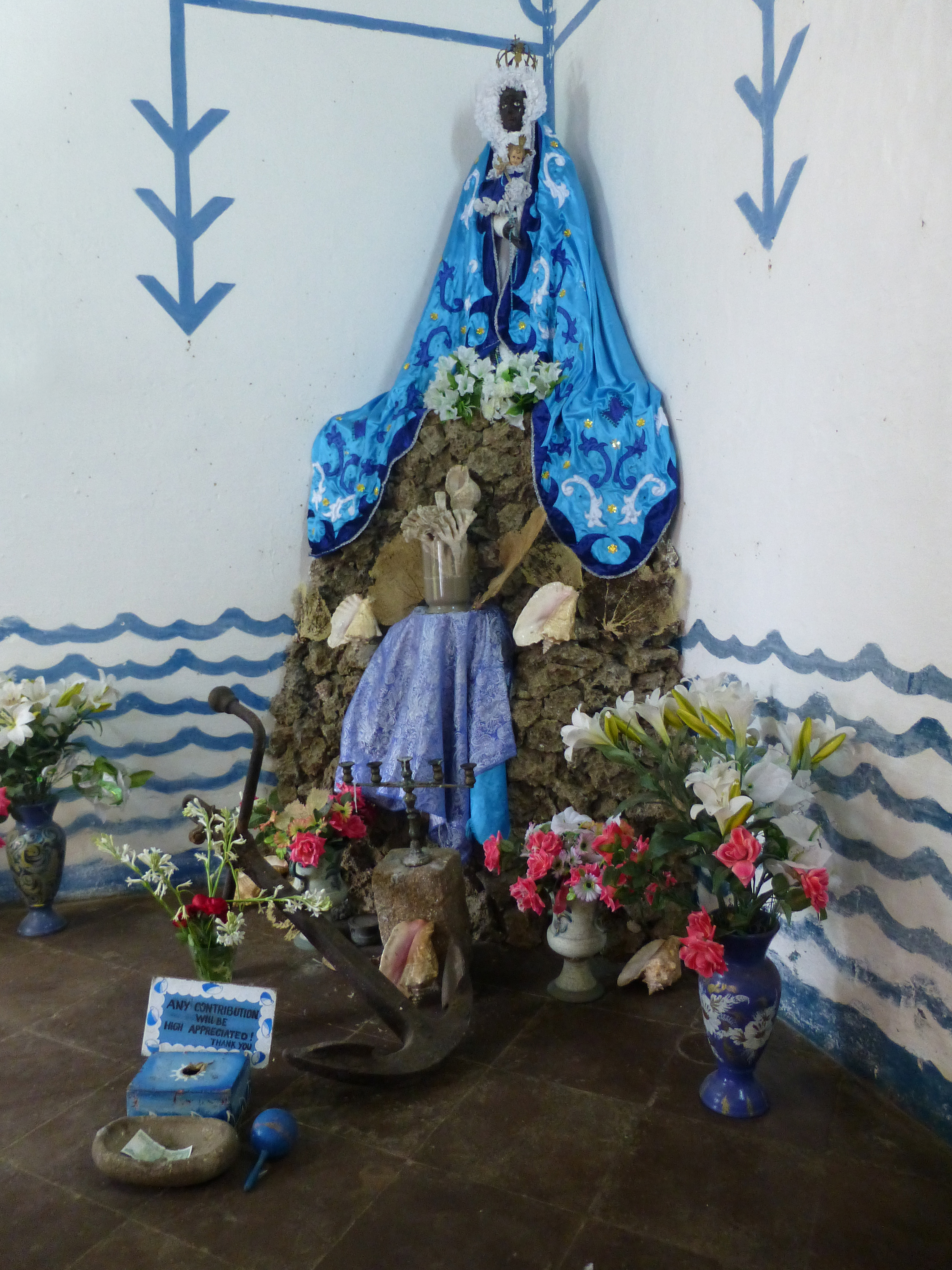 Santería à Trinidad (Cuba) : Templo Yemalla (Yemayá)